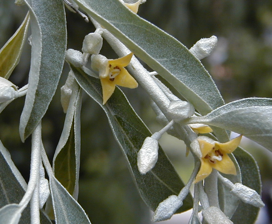 Elaeagnus angustifolia. Real Jardín Botánico, Madrid.